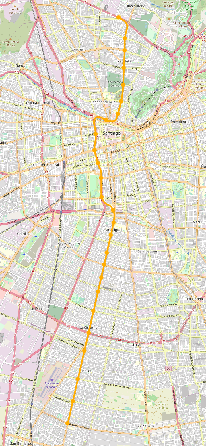 Mapa con el recorrido de la Línea 2 del Metro de Santiago